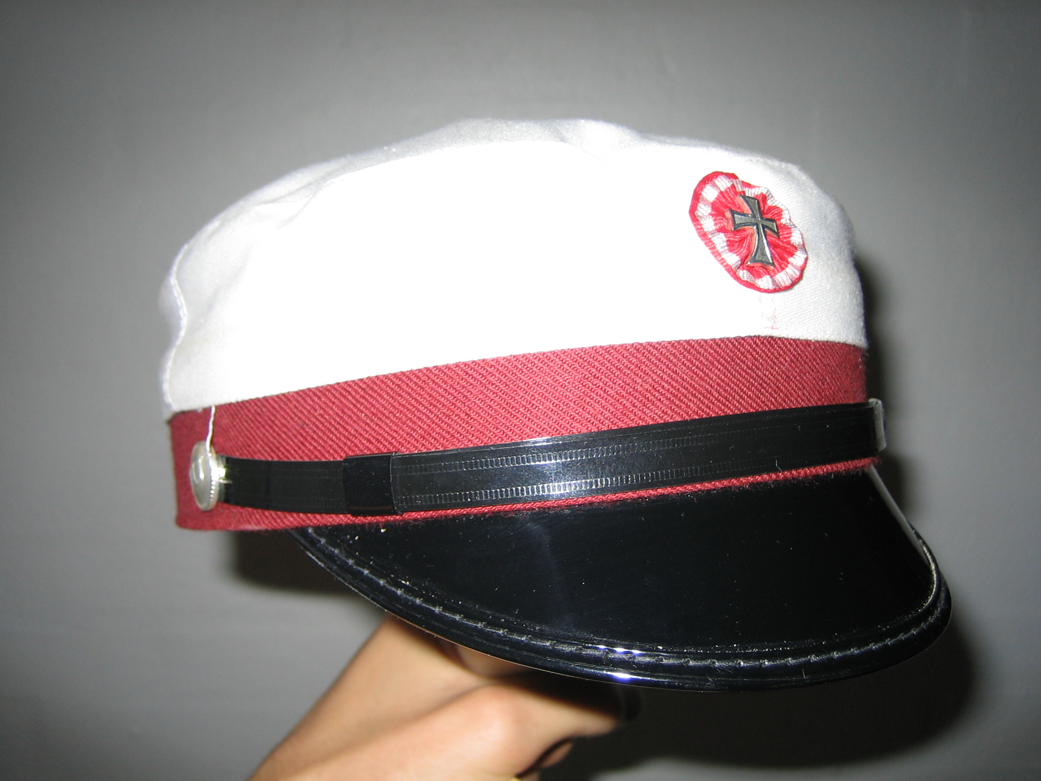 Studenterhue fra det almene gymnasium 2005